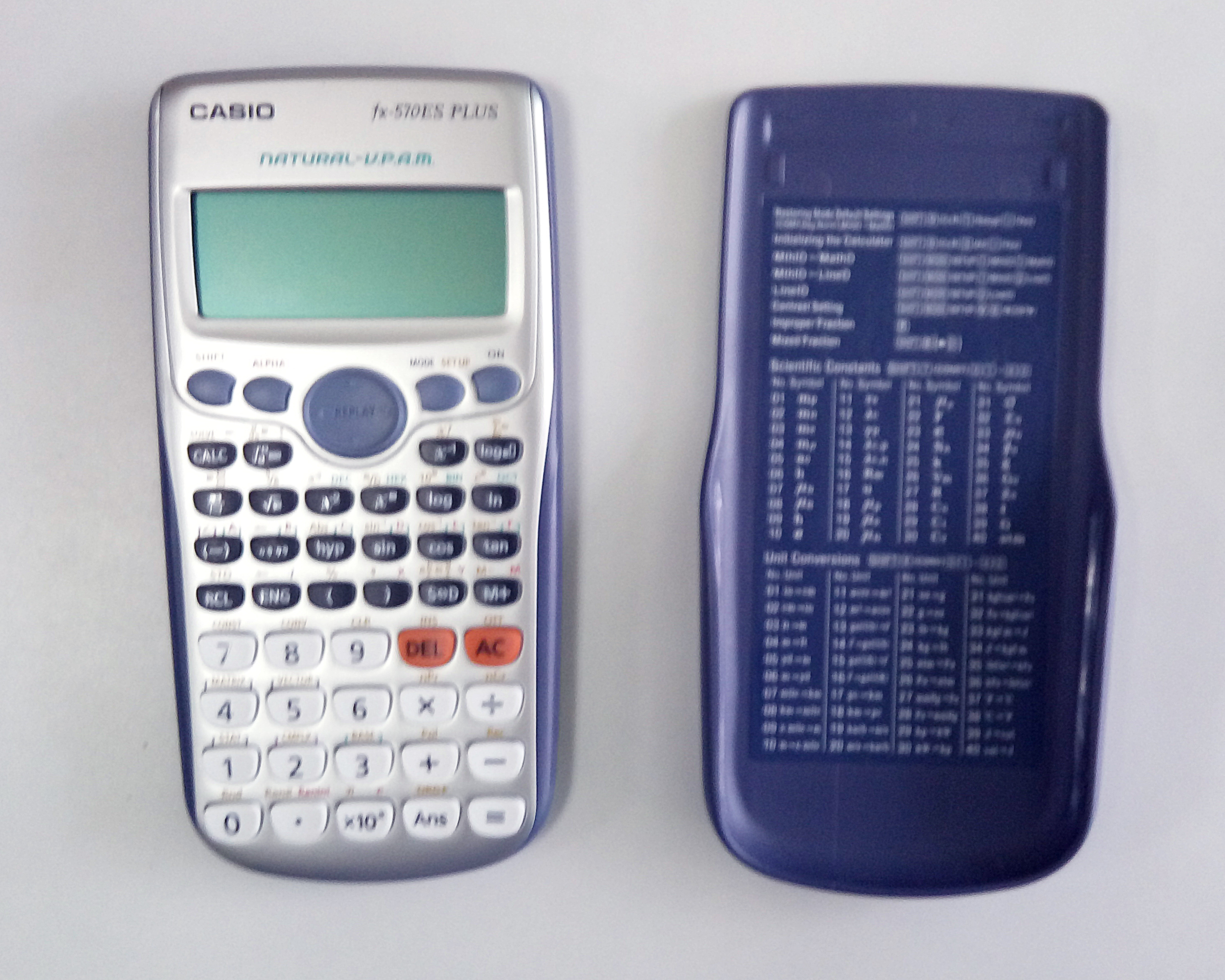 fx-991es plus (不含殼)